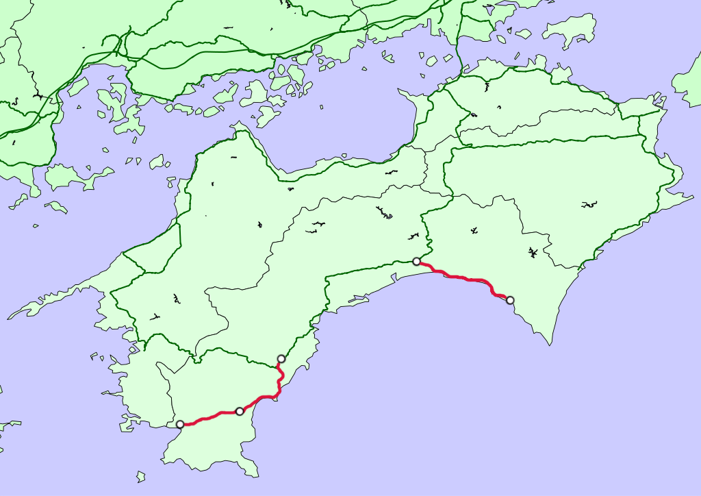 Dessin montrant les lignes de la Société des chemins de fer Tosa Kuroshio